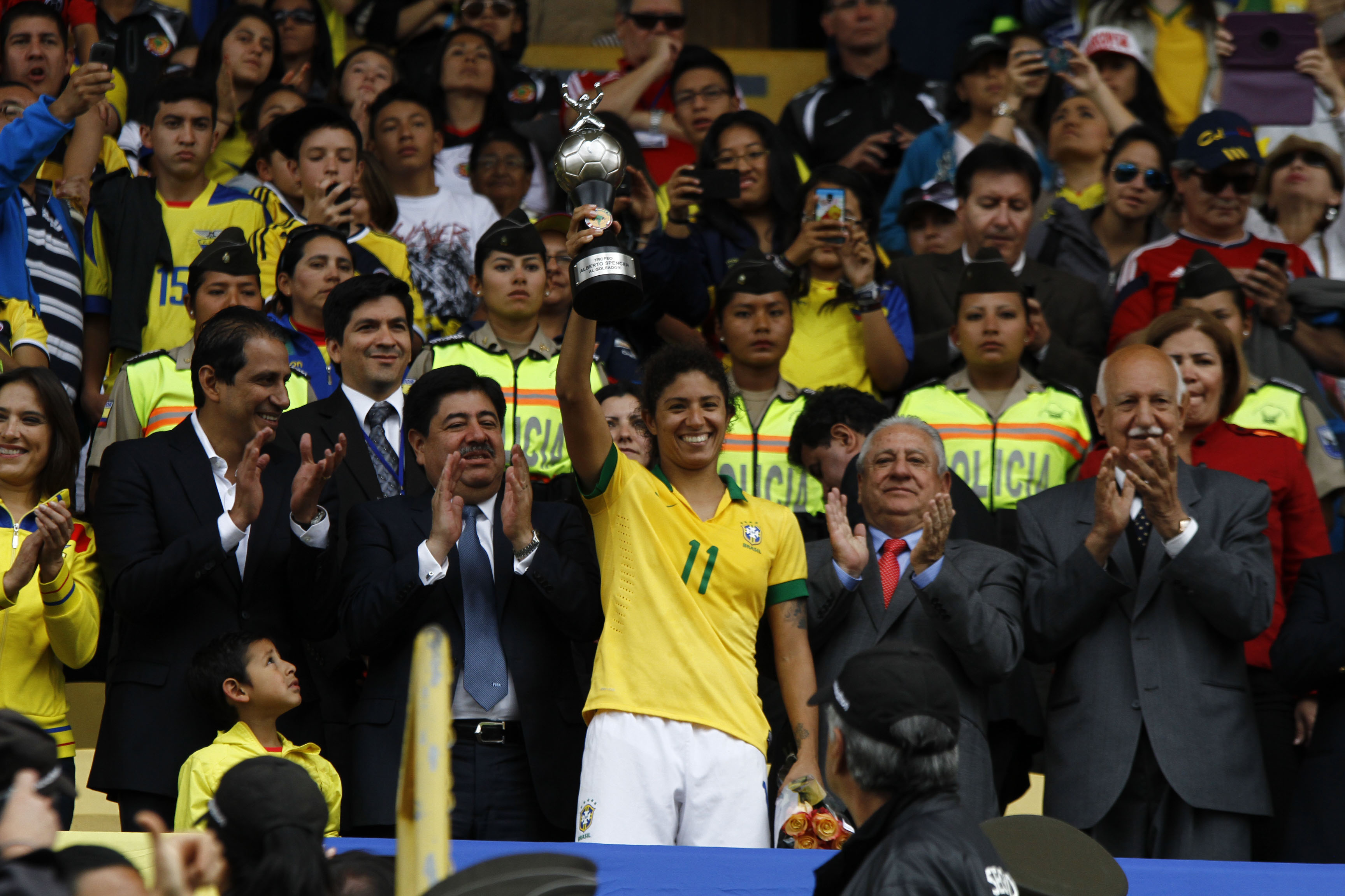 Quito, 28 sep (Andes).- La selección brasileña femenina de fútbol se proclamó Campeona de la Copa América de Fútbol Ecuador 2014. Foto: Micaela Ayala V./Andes